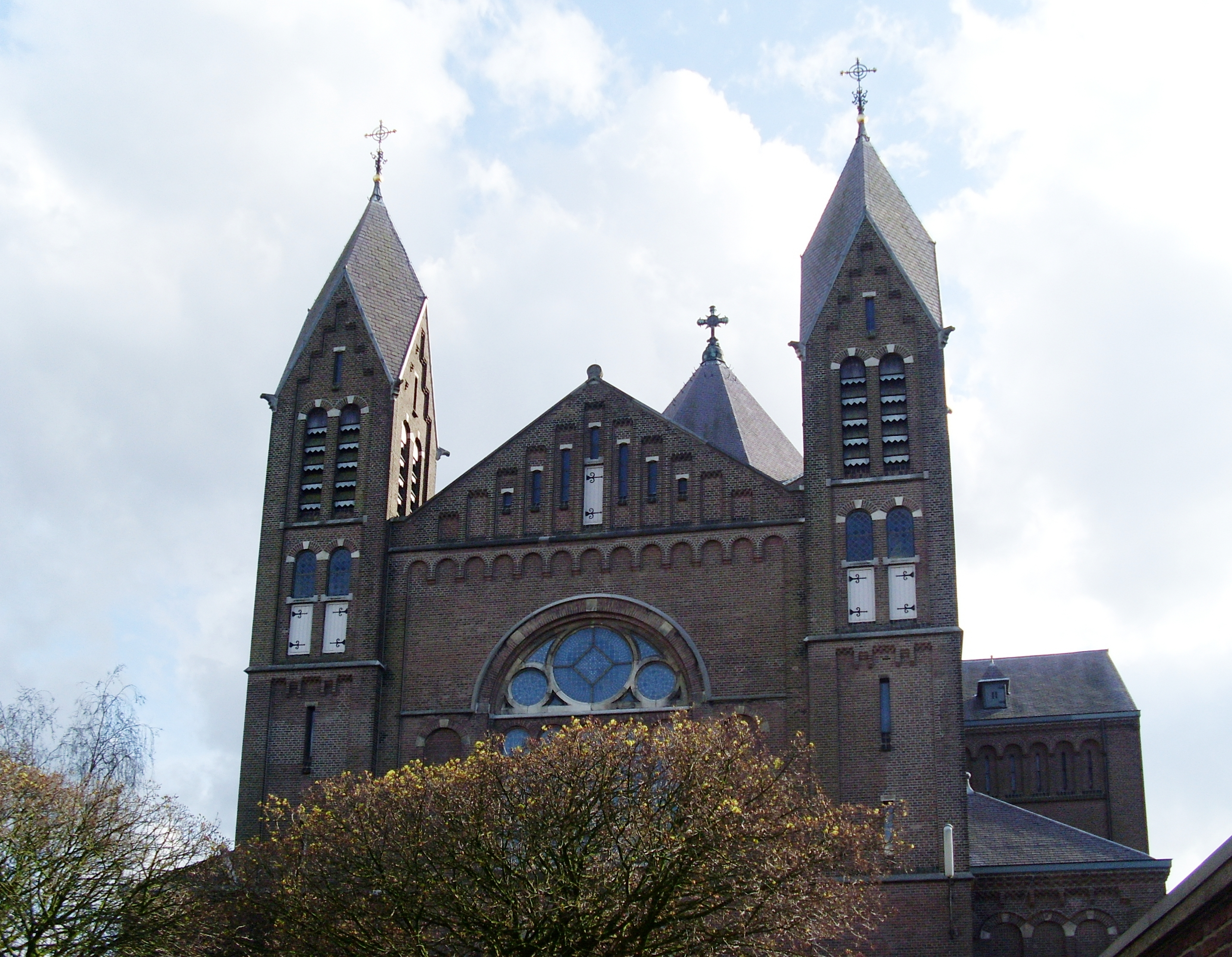 St Jozefkerk Nijmegen, sinds 2004 Titus Brandsma gedachteniskerk